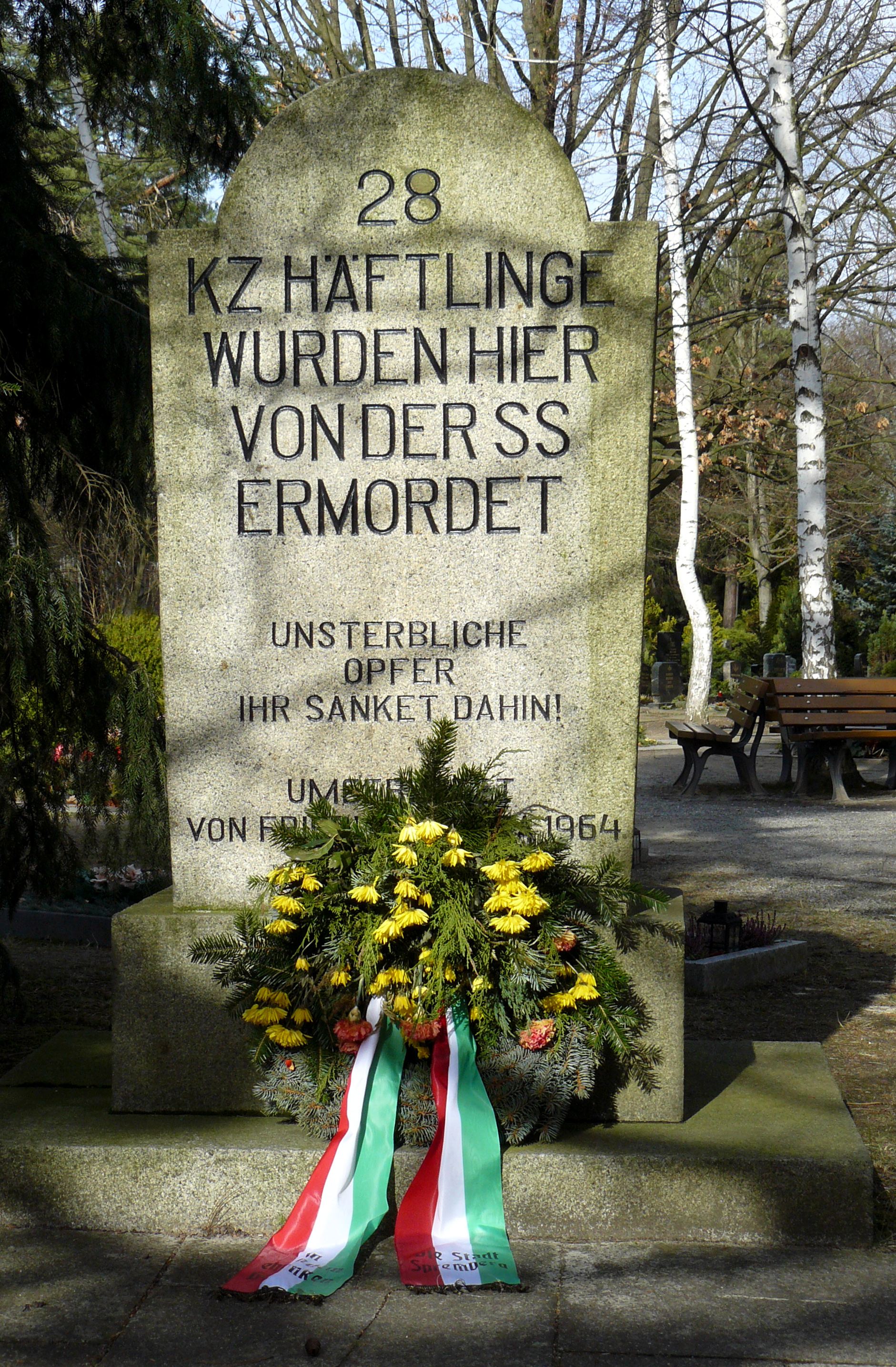 Gedenkstein auf dem Spremberger Waldfriedhof für 28 Opfer des Todesmarsches von 630 Häftlingen des KZ Groß Rosen vom April 1945.